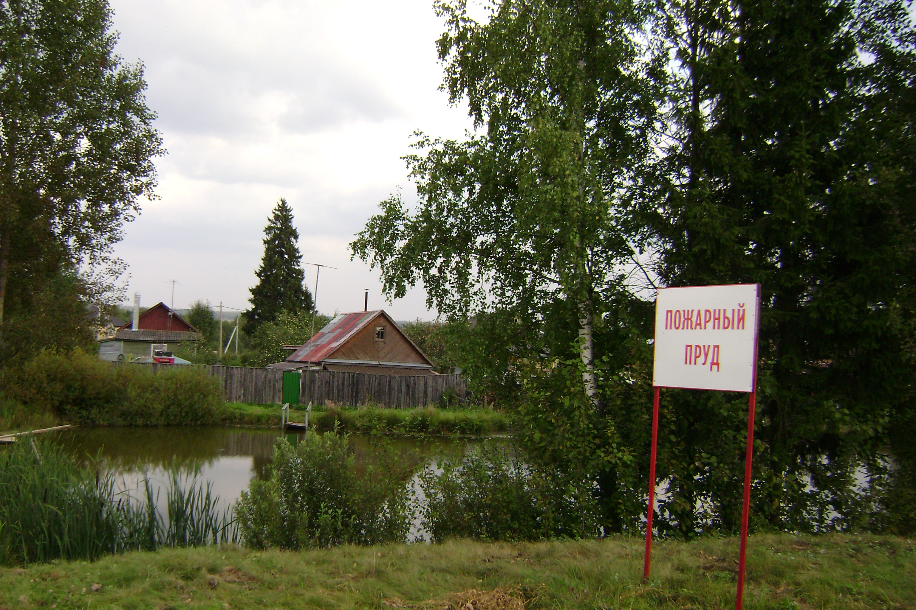 Пожарный пруд